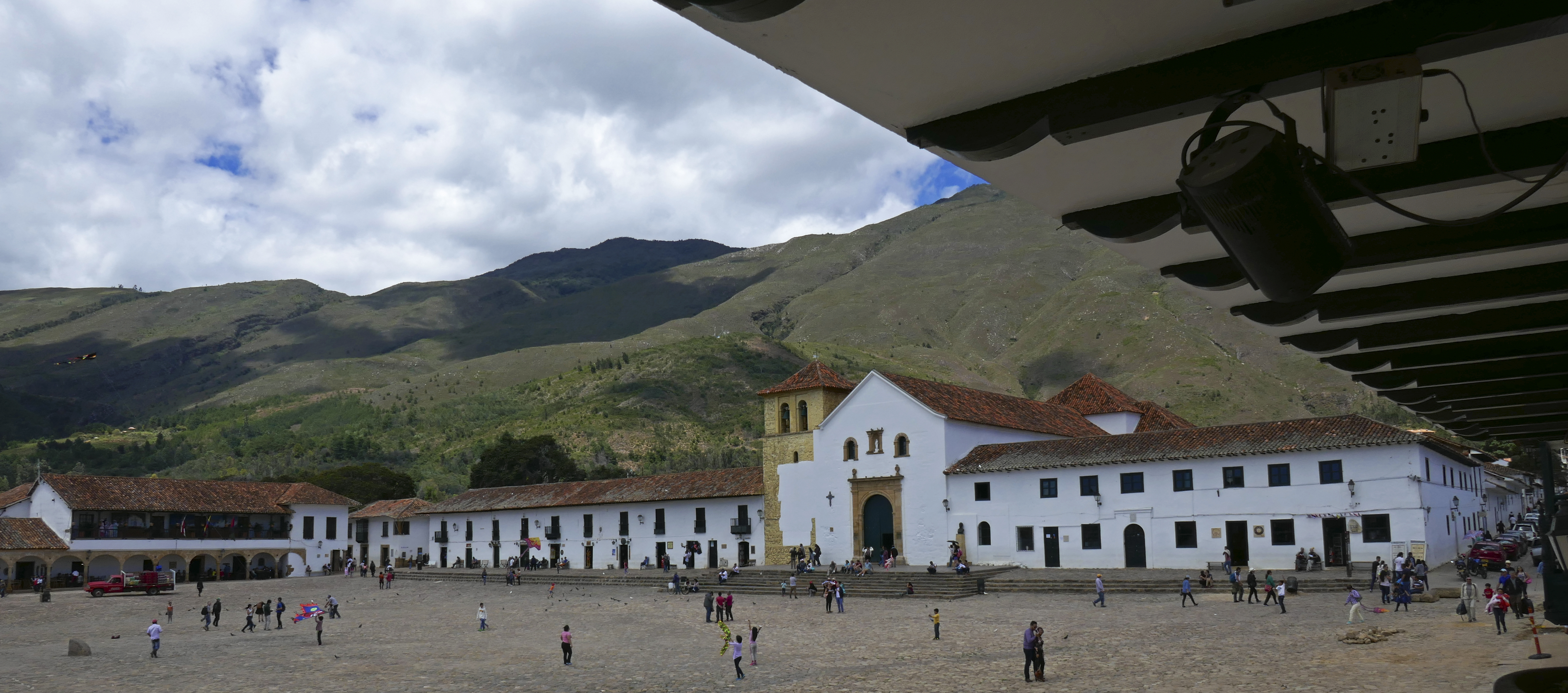 Plaza Mayor de Villa de Leyva, municipio colombiano del departamento de Boyacá.